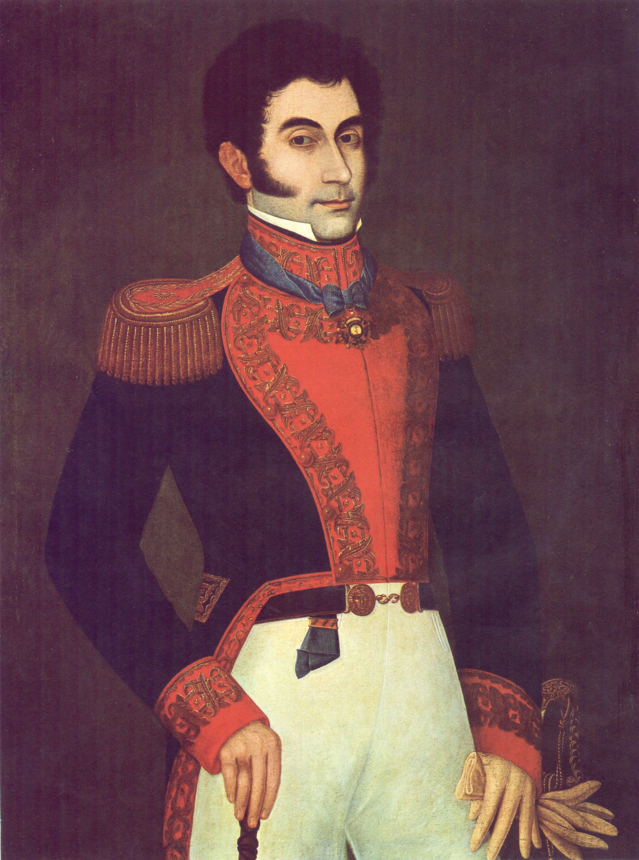 Retrato de Mariano Necochea (1825). Óleo sobre tela 104.5 x 78 cm.